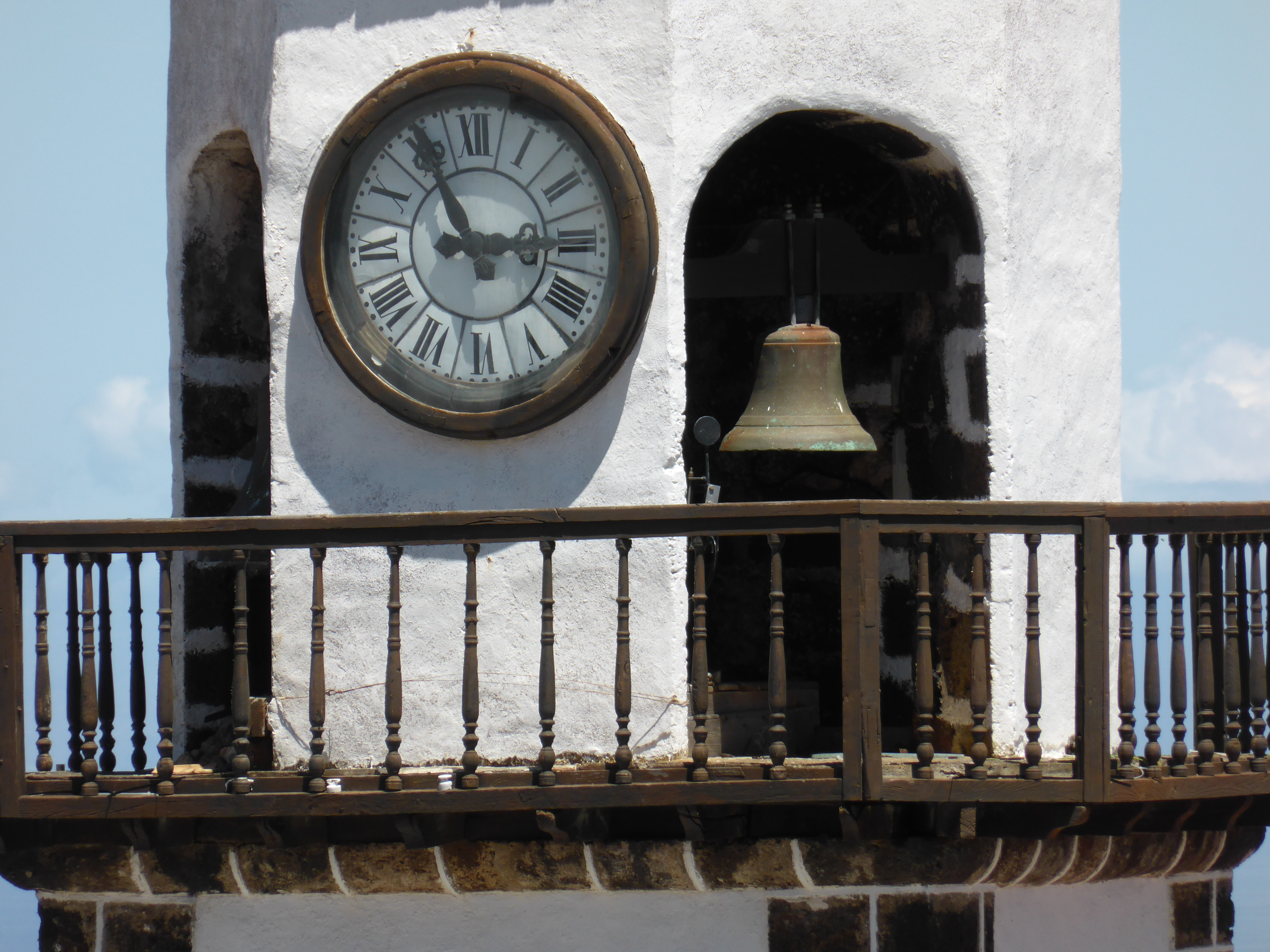 Detalle del campanario de la iglesia de la Concepción, en la Villa de Valverde, isla de El Hierro. Esta iglesia se terminó en el año 1820. Es de estilo barroco clasicista. El campanario es de planta octogonal, en el que se abren cuatro arcos de medio punto, en cuyo interior se disponen las campanas.